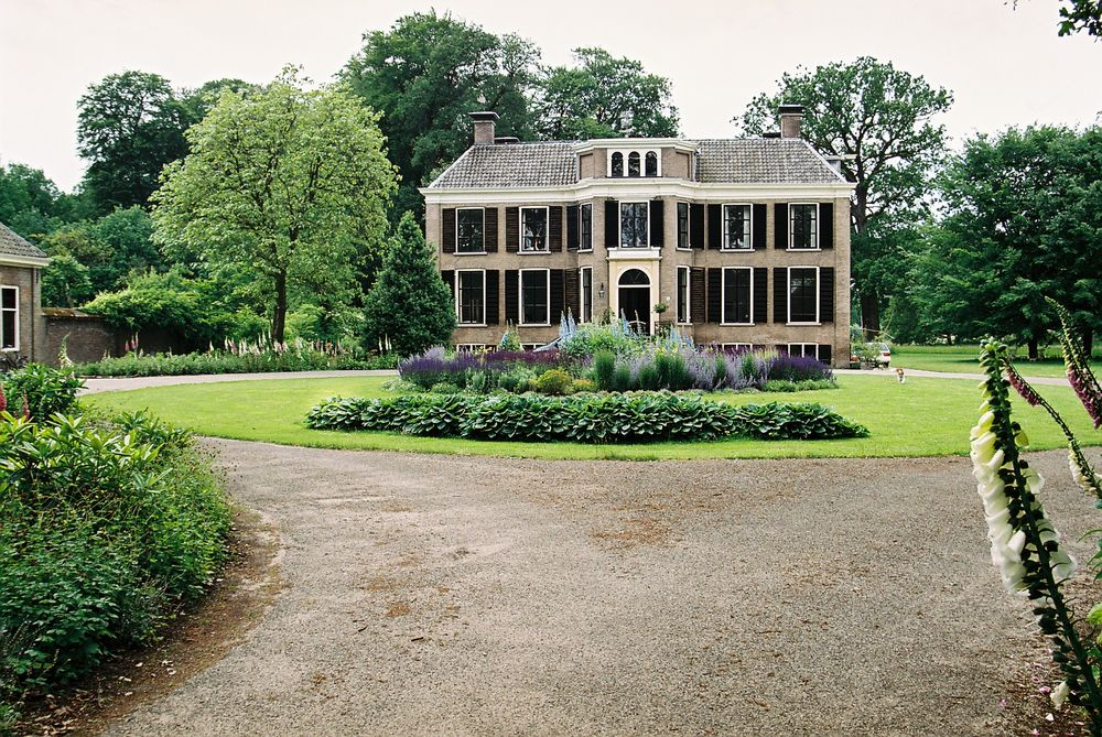 Huis de Velhorst te Laren, Lochem.